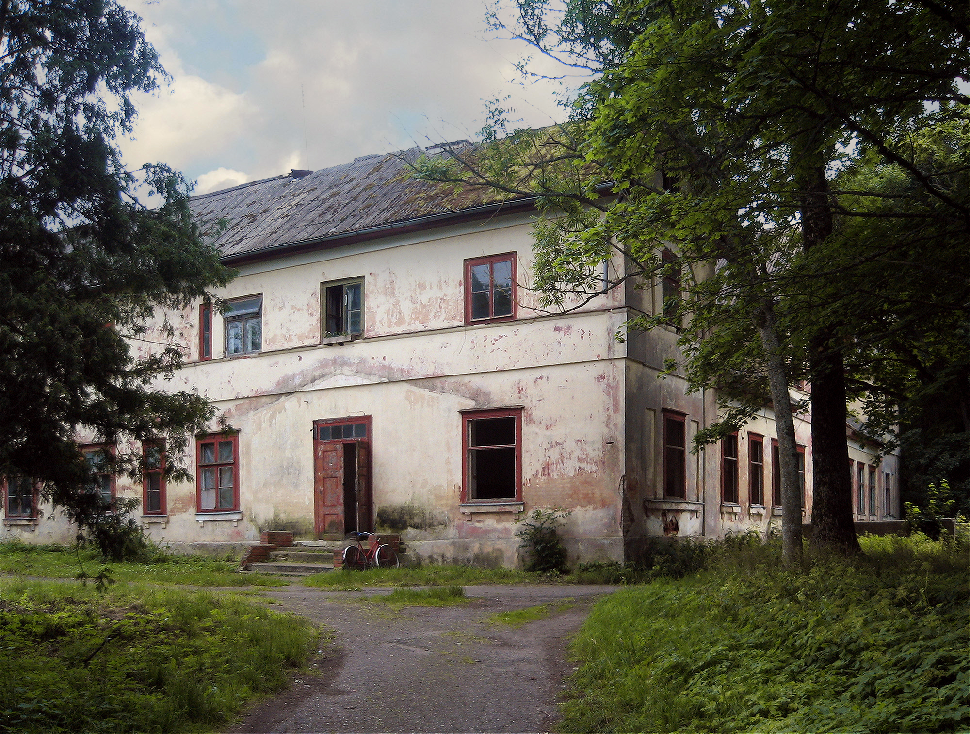 Lubezeres muižas kungu māja